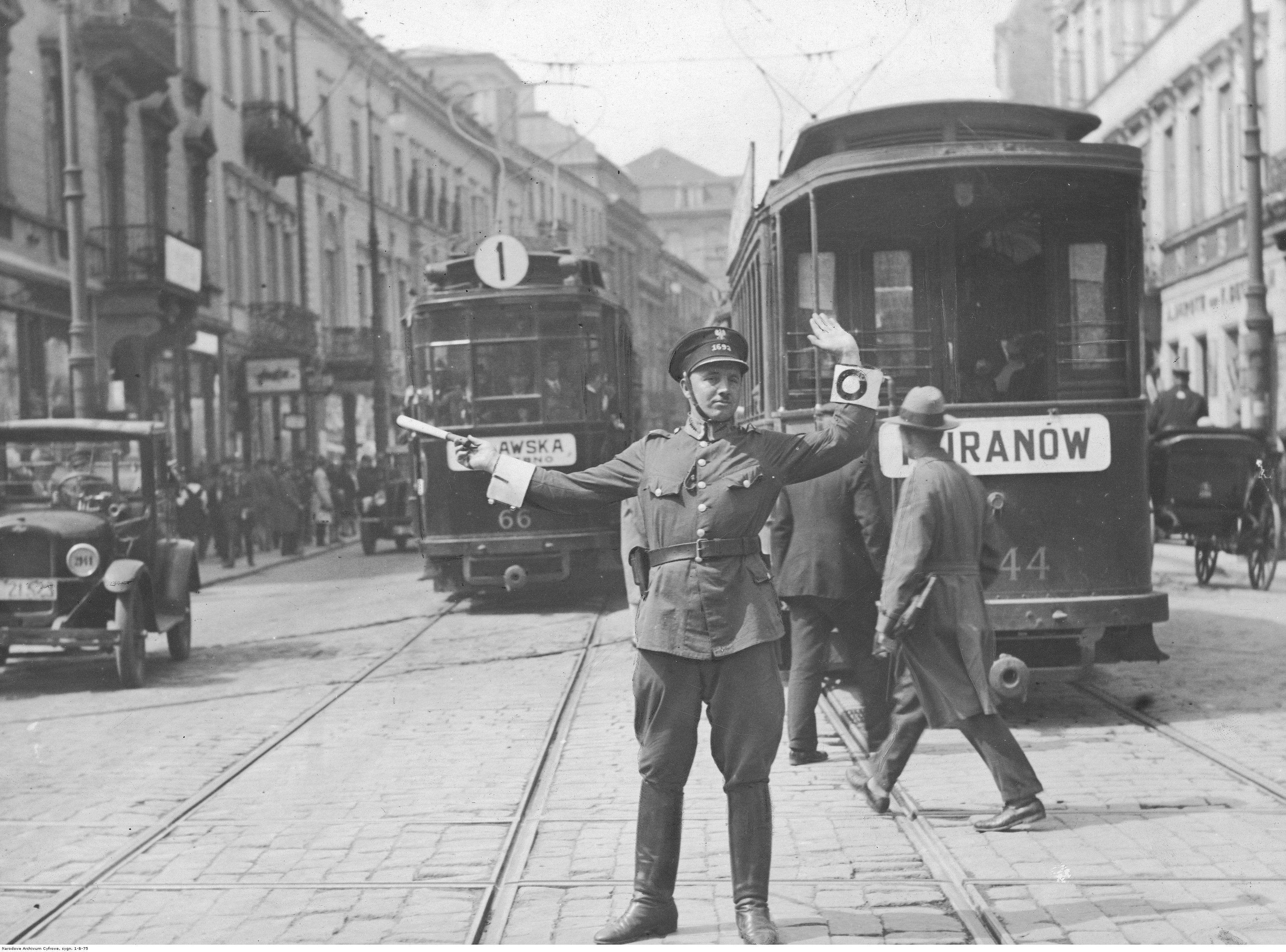 Policjant kierujący ruchem na ulicy Nowy Świat. Z lewej widoczny tramwaj typu A linii nr 1, z prawej tył wagonu doczepnego P-9.